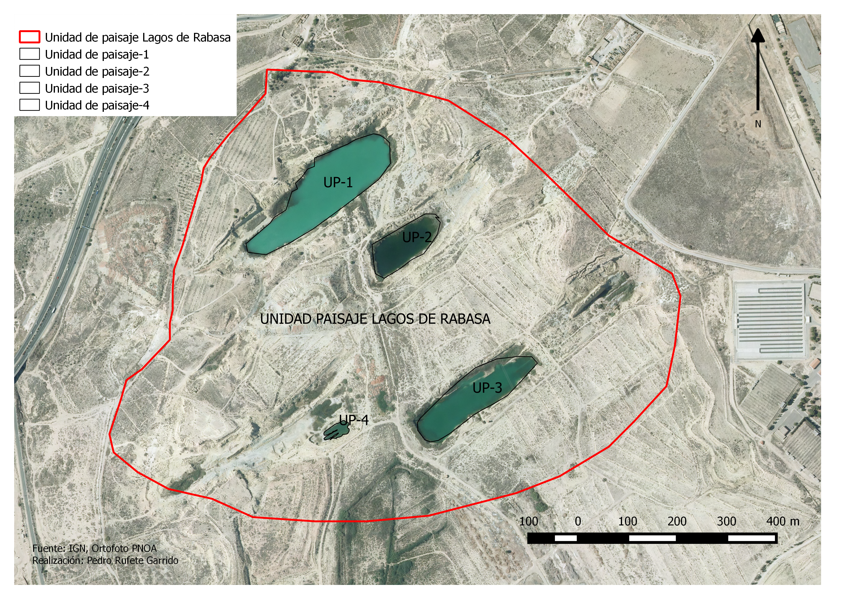 Mapa de unidad de paisaje de los lagos de Rabassa